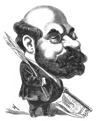 Portrait satirique de Arthur Ranc.